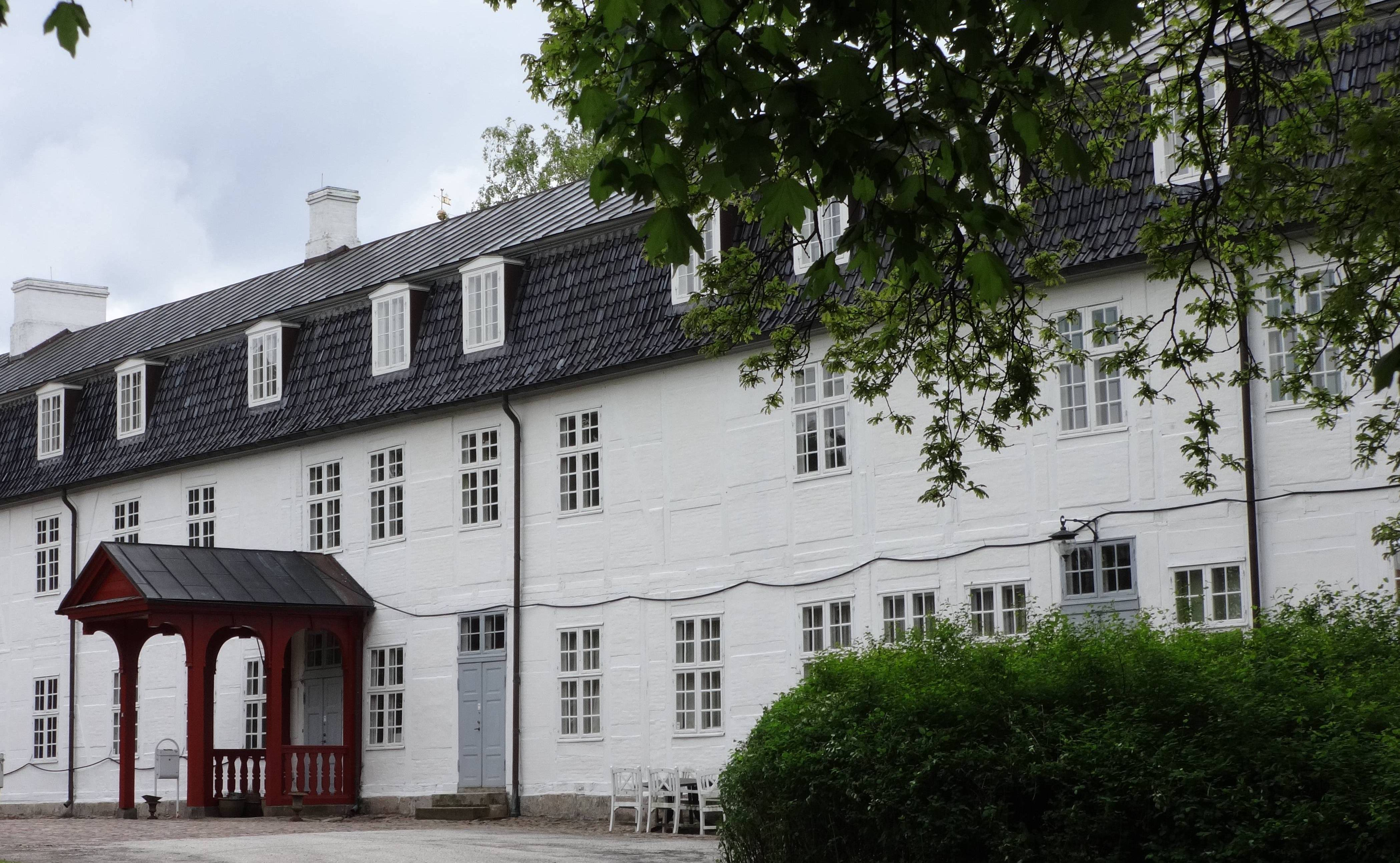 Schloss Sorgenfri: Seitenflügel Damebygningen, Details